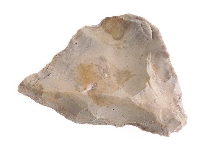 Pointe de silex dont la face supérieure est marquée d'une arête centrale oblique. Talon dièdre. Elle provient du site de Goaréva sur l'île de Bréhat.